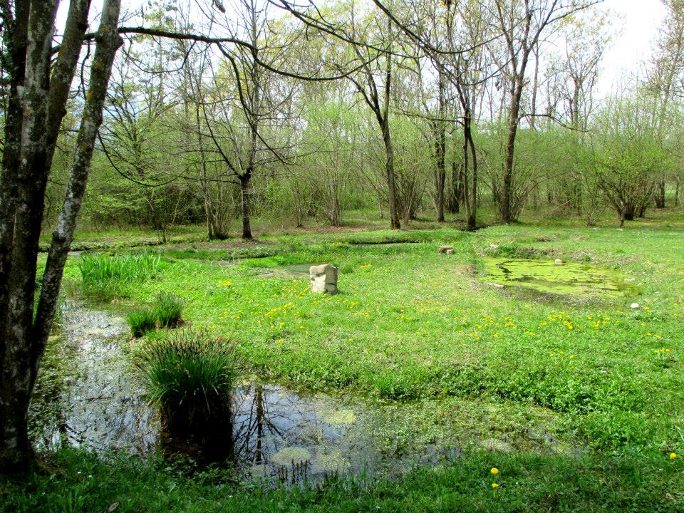 Zona umida dell'apiario presso la Riserva naturale Vincheto di Celarda, Feltre - Belluno - Italia